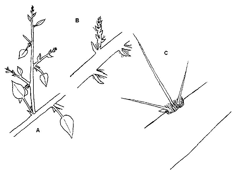 Az areola evolúciójának hipotetizált, sematikus rajza